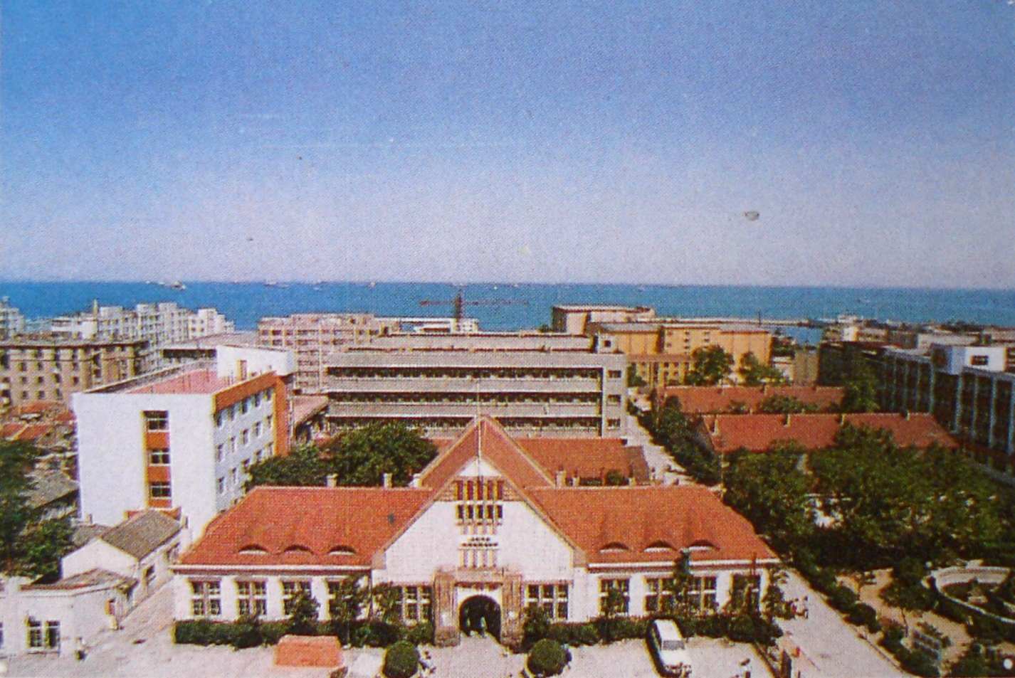 青岛中西医结合医院